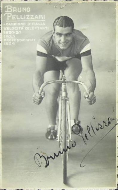 Bruno Pellizzari foto autografata